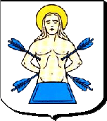 Blason de Obersoultzbach